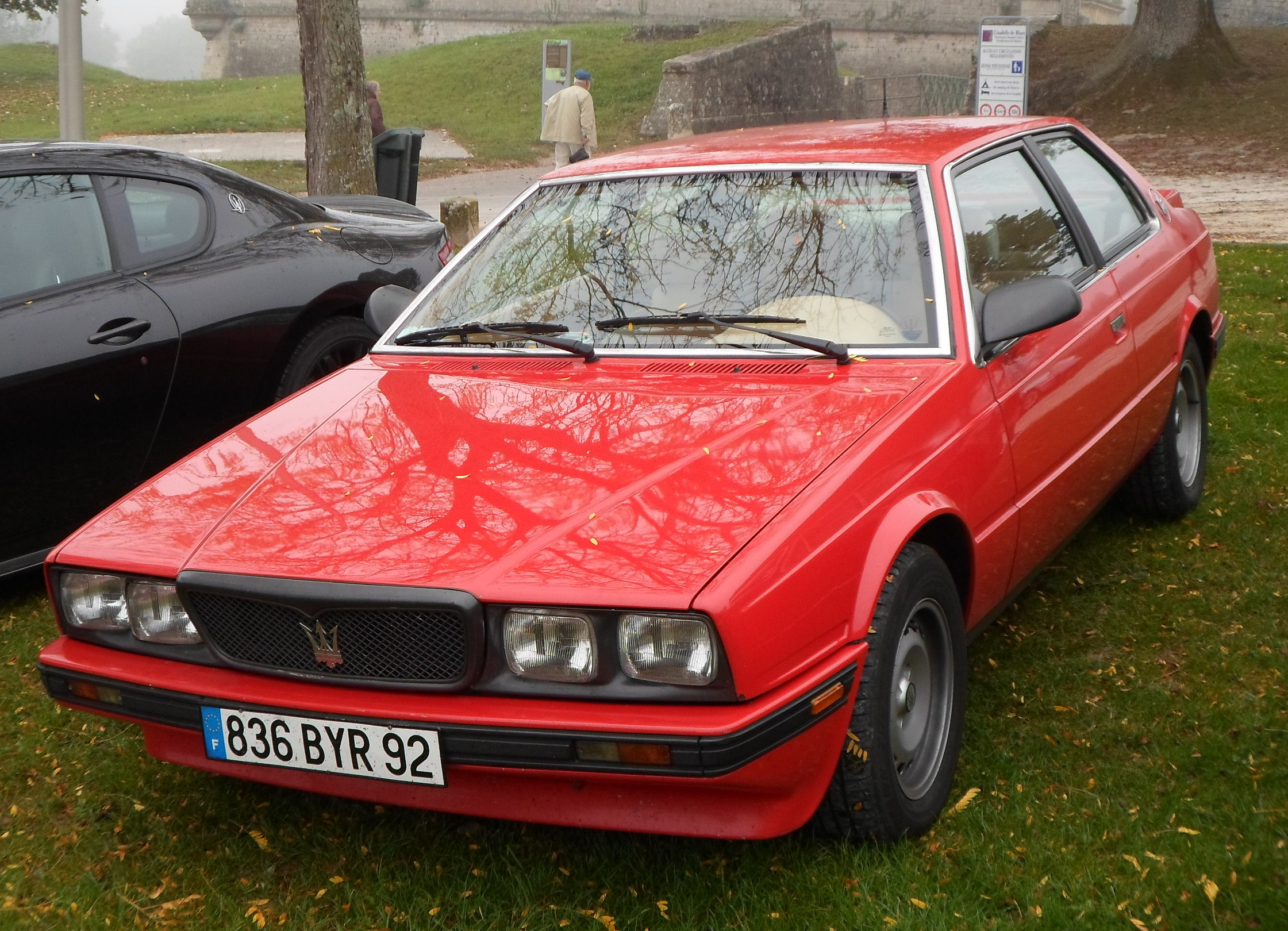 Maserati 222 en 2017